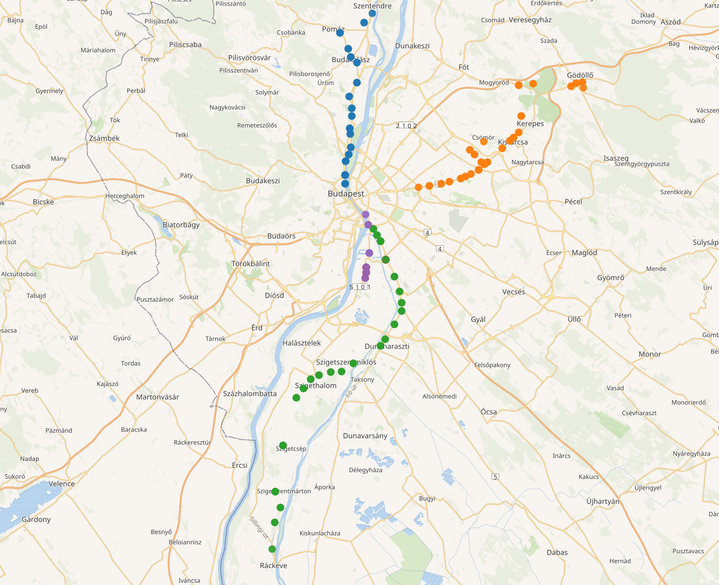 A Budapesti HÉV állomásai This map may be incomplete, and may contain errors. Don't rely solely on it for navigation.